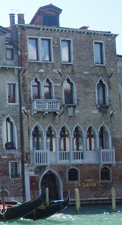 palais orio semitecolo benzon grand canal venise